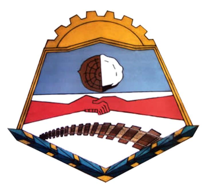 Escudo de Armas de la localidad de Pirané (Formosa, Argentina)